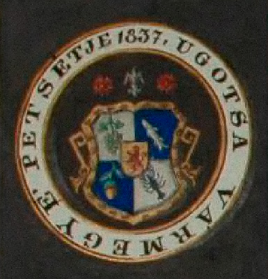 Печатка комітату Угоча - 1837 рік